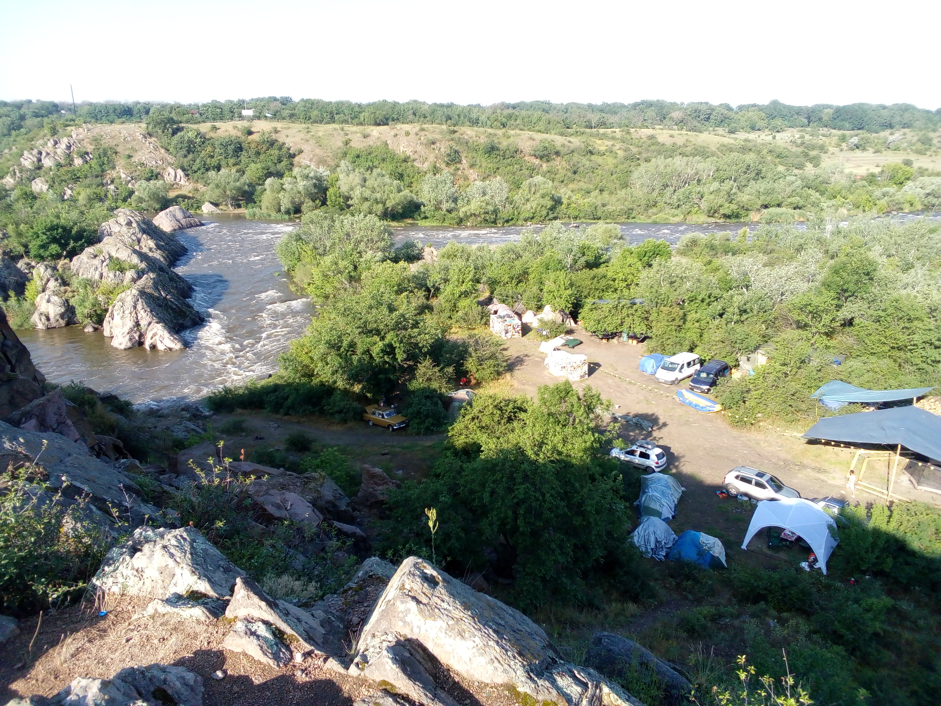 Порог Интеграл на реке Южный Буг возле села Мигия